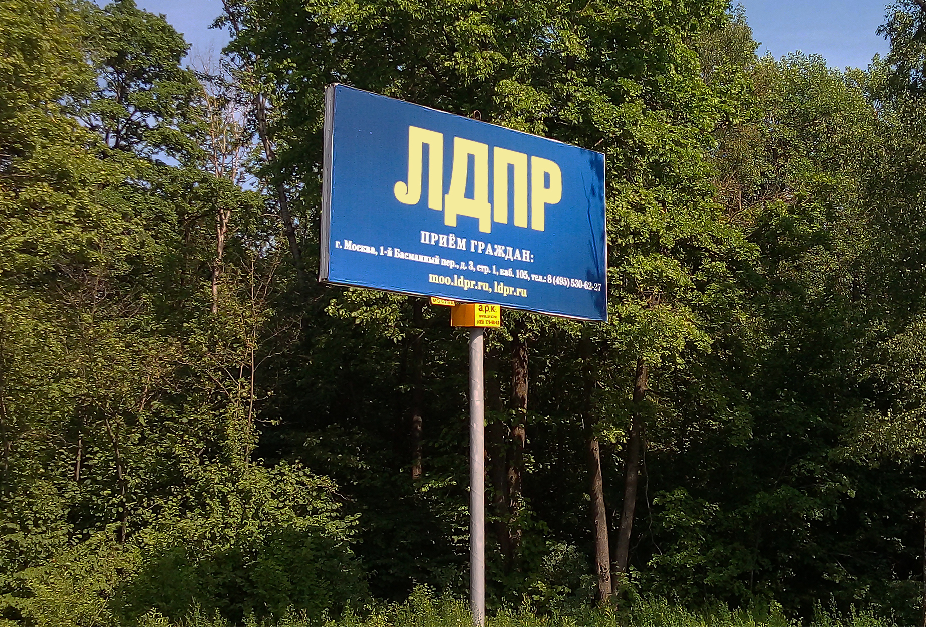 Агитационный щит ЛДПР в 150 метрах от д. 72 Фряновского шоссе, северная граница города Щёлково, июнь 2019 года